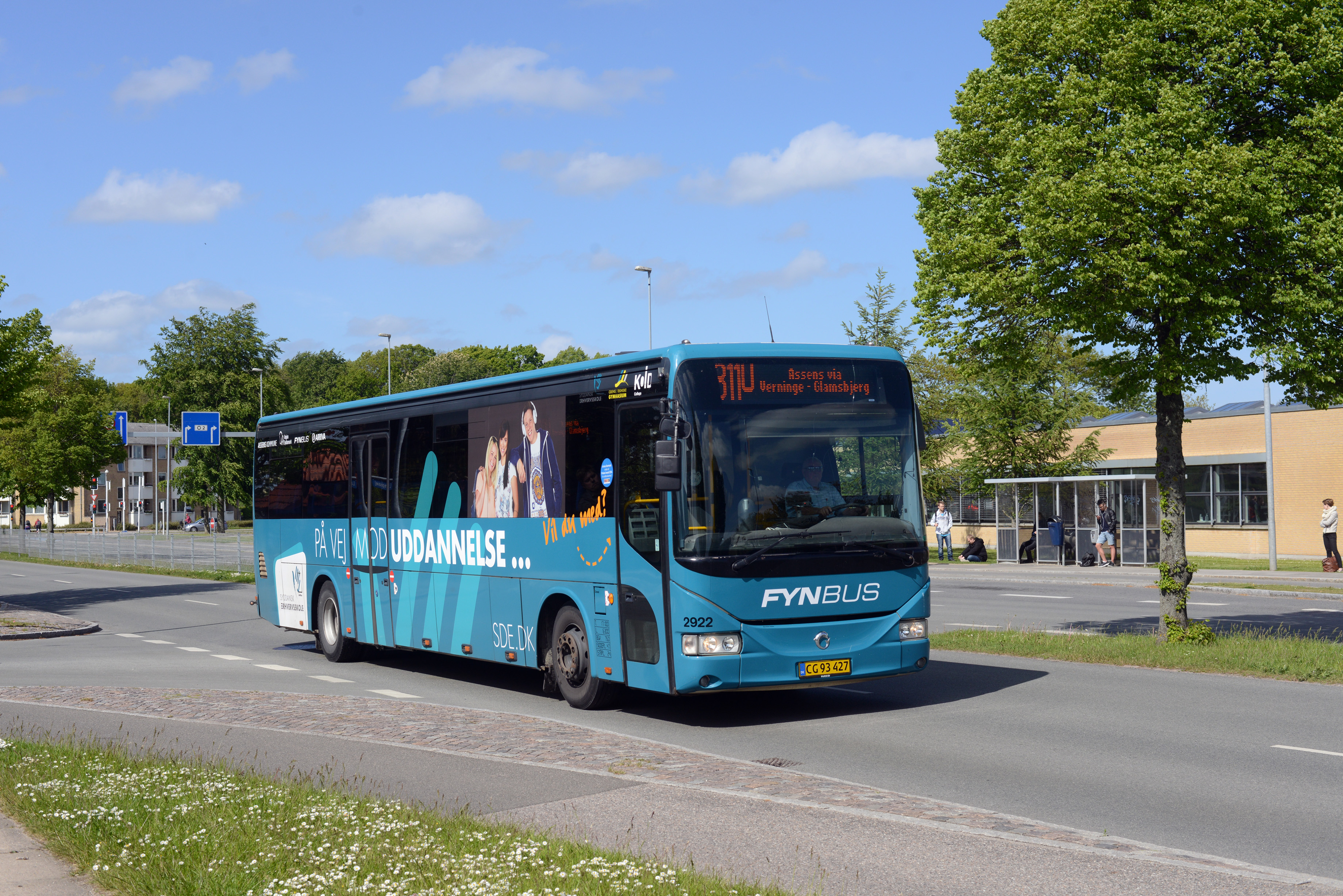 Uddannelsesbus på Munkebjergvej ud for Langesøvej. I baggrunden til højre ses Syddansk Erhvervsskole og helt i baggrunden krydset for Munkerisvej.